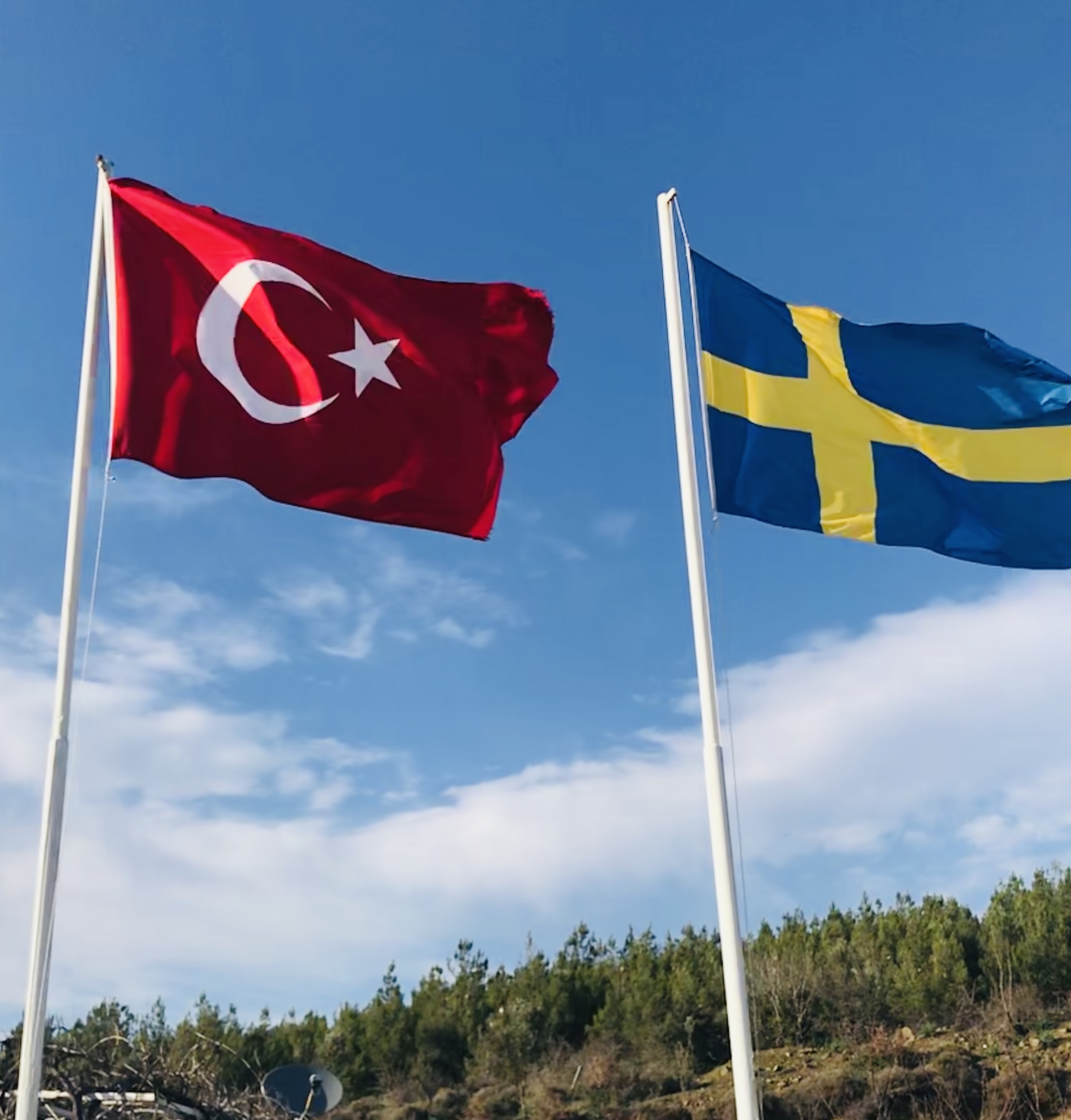 İsveç merkezli bir fabrikanın önünde yer alan Türkiye ve İsveç bayrakları, Bergama, İzmir, Türkiye.